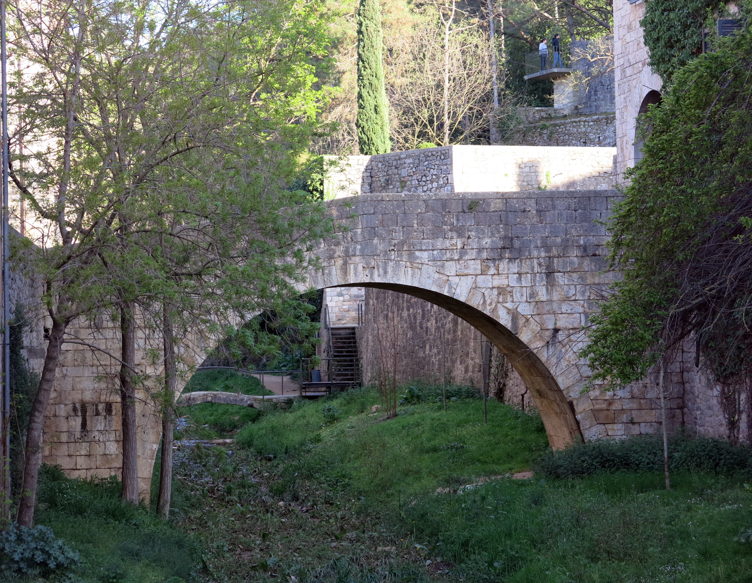 Nucli antic de Girona